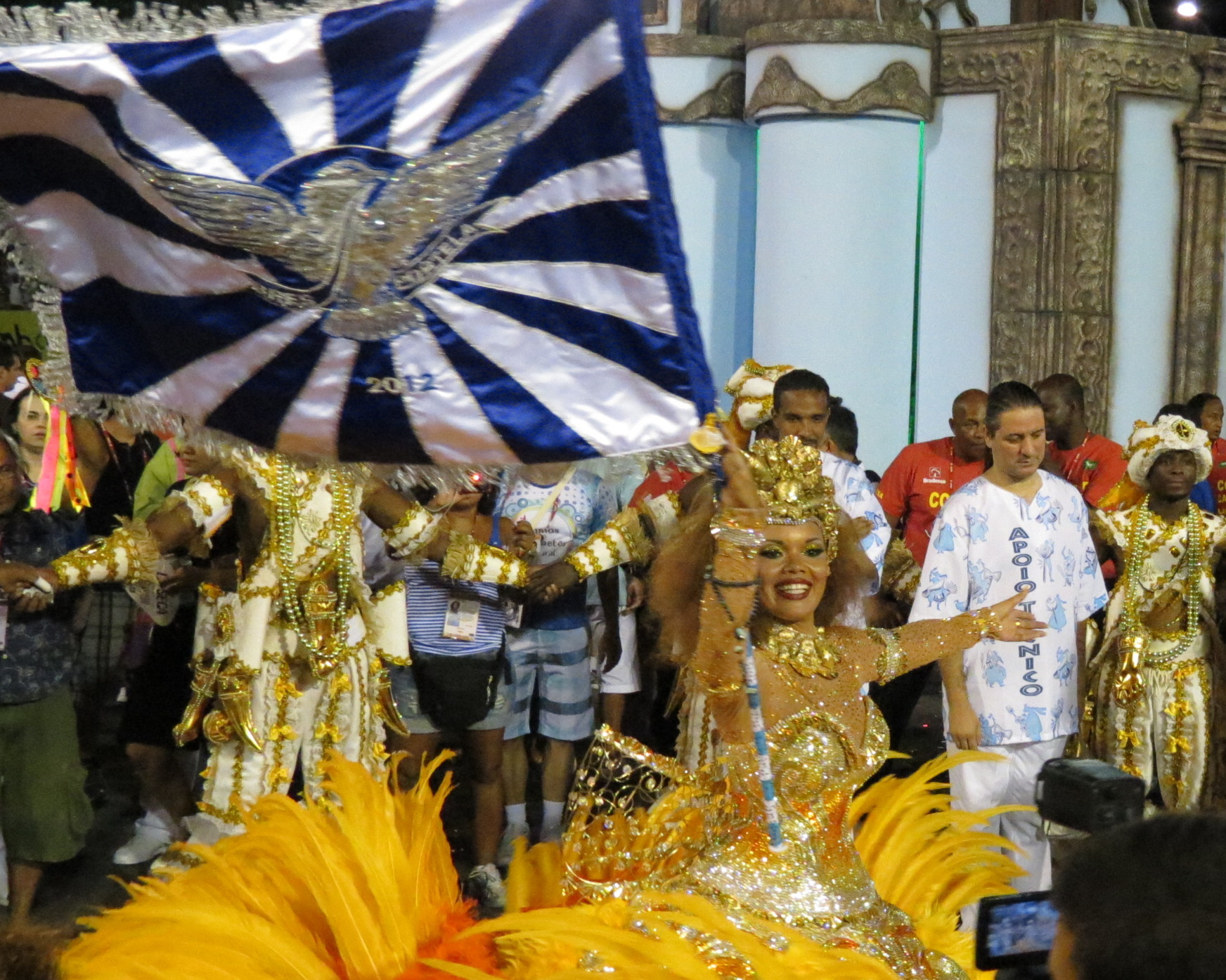 G.R.E.S Portela Samba School Rio Carnaval 2012 10